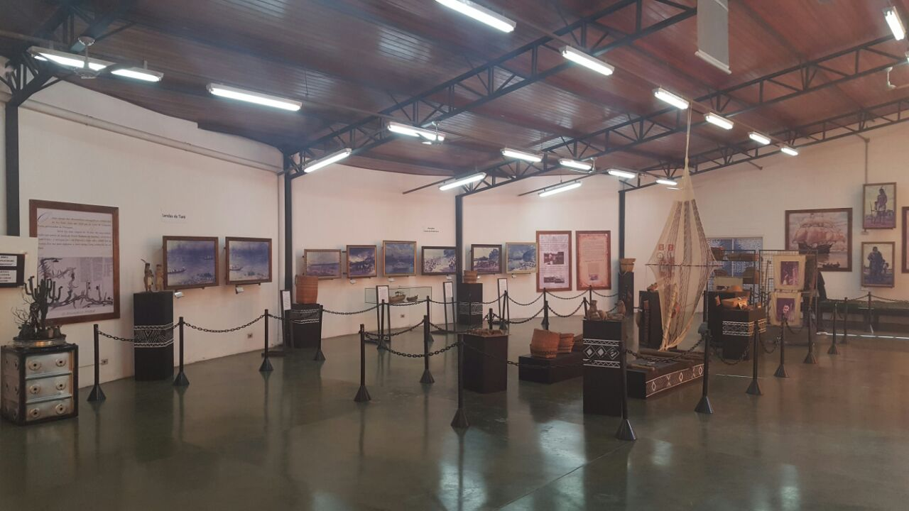 Interior do Museu